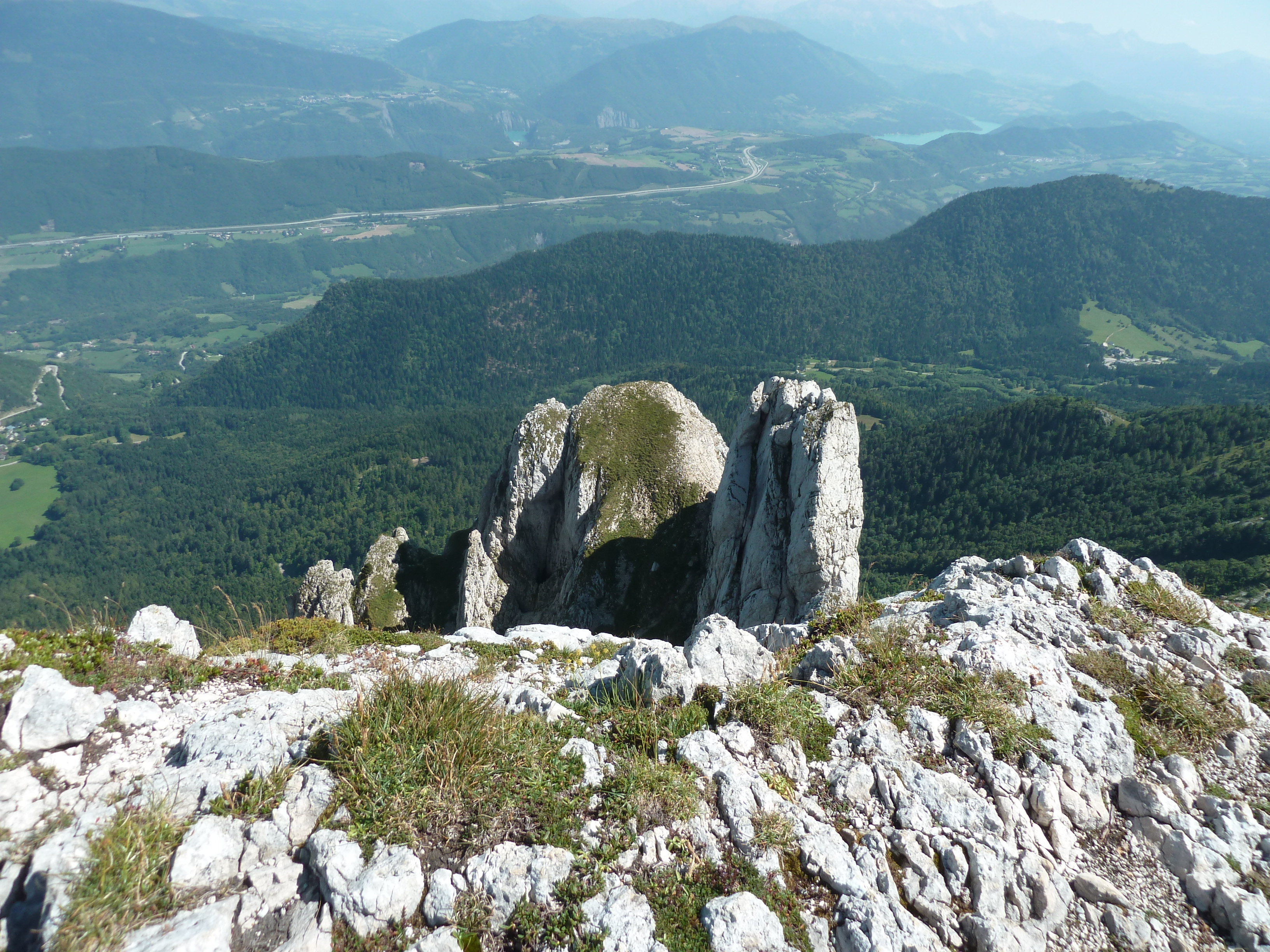 Pas de l'Oeille (Vercors) : Vue de la région Matheysine, depuis le Pas de l'Oeille.